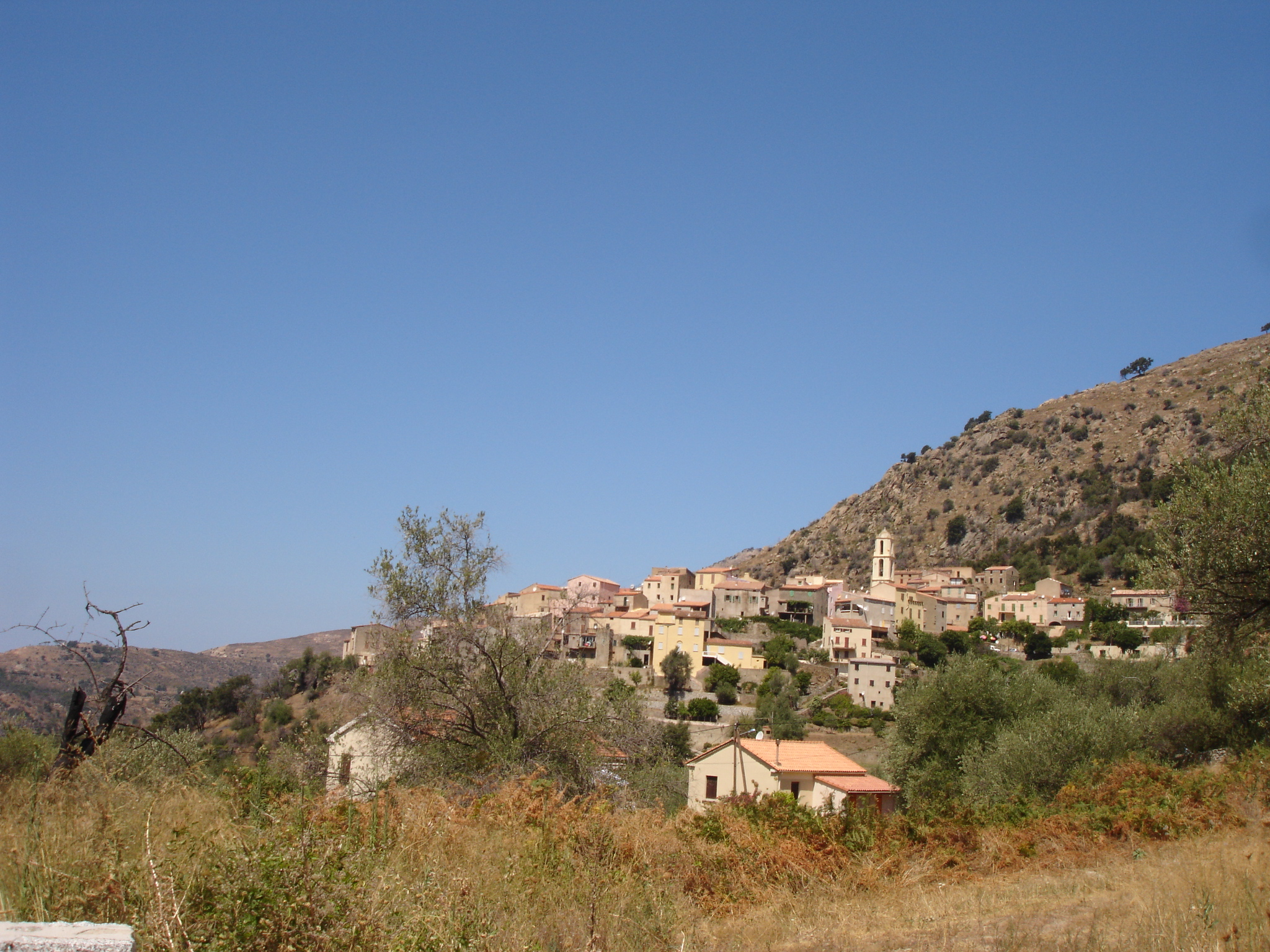 France, Haute-Corse (2B), Montegrosso, hameau de Cassano